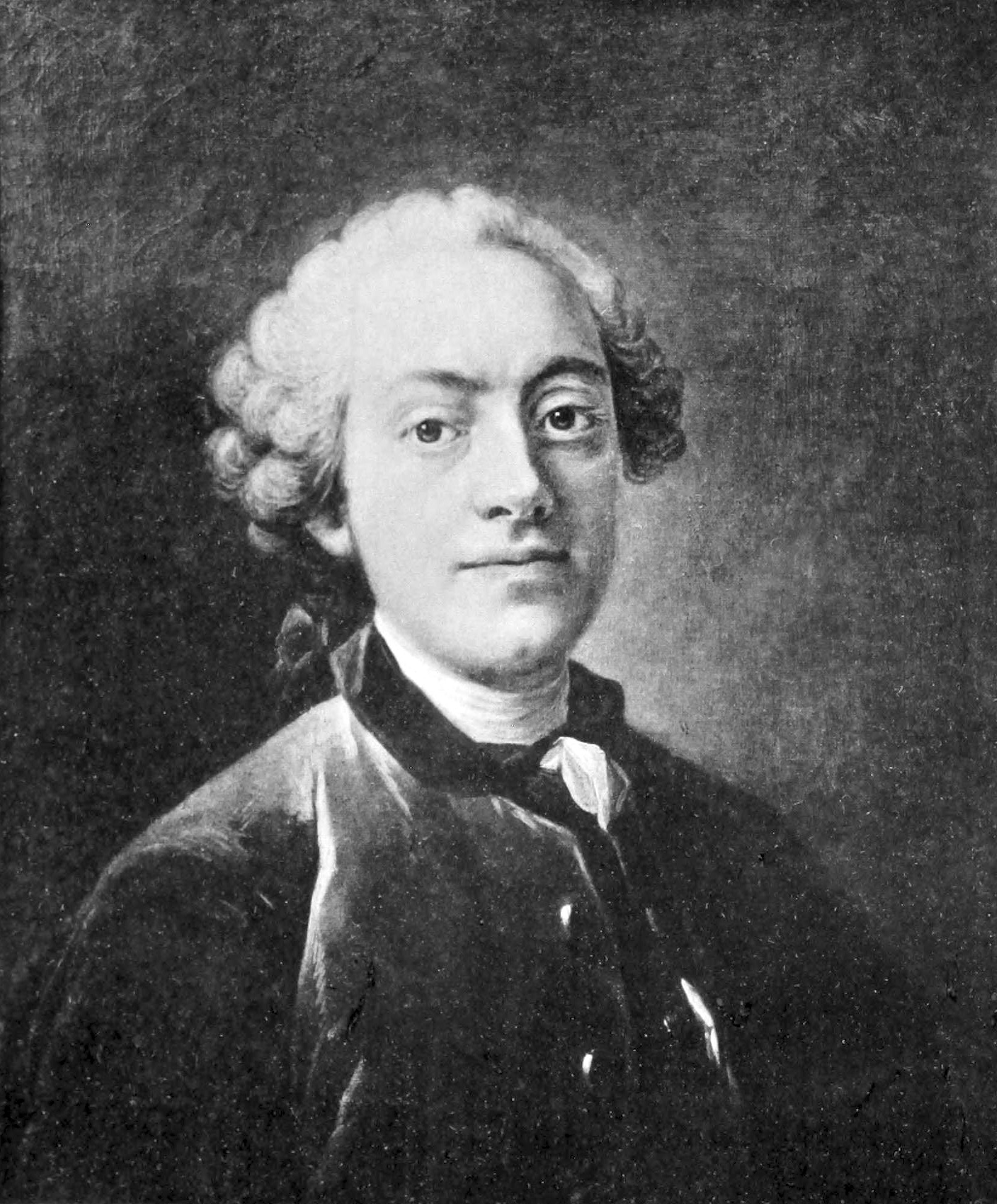 Pehr Zetzell (1724-1802). Medelålders man, bröstbild, fas t. v., med hvit peruk i lockar öfver örat, det svarta nackbandet om halsen, hvit lindad halsduk, krås, sammetsrock utan krage, oknäppt. Brungul bakgrund. Olja på duk, 71 x 62 ctm. Utmärkt vackert porträtt af okänd mästare. Tillhör D:r V. Lundberg, Stockholm.